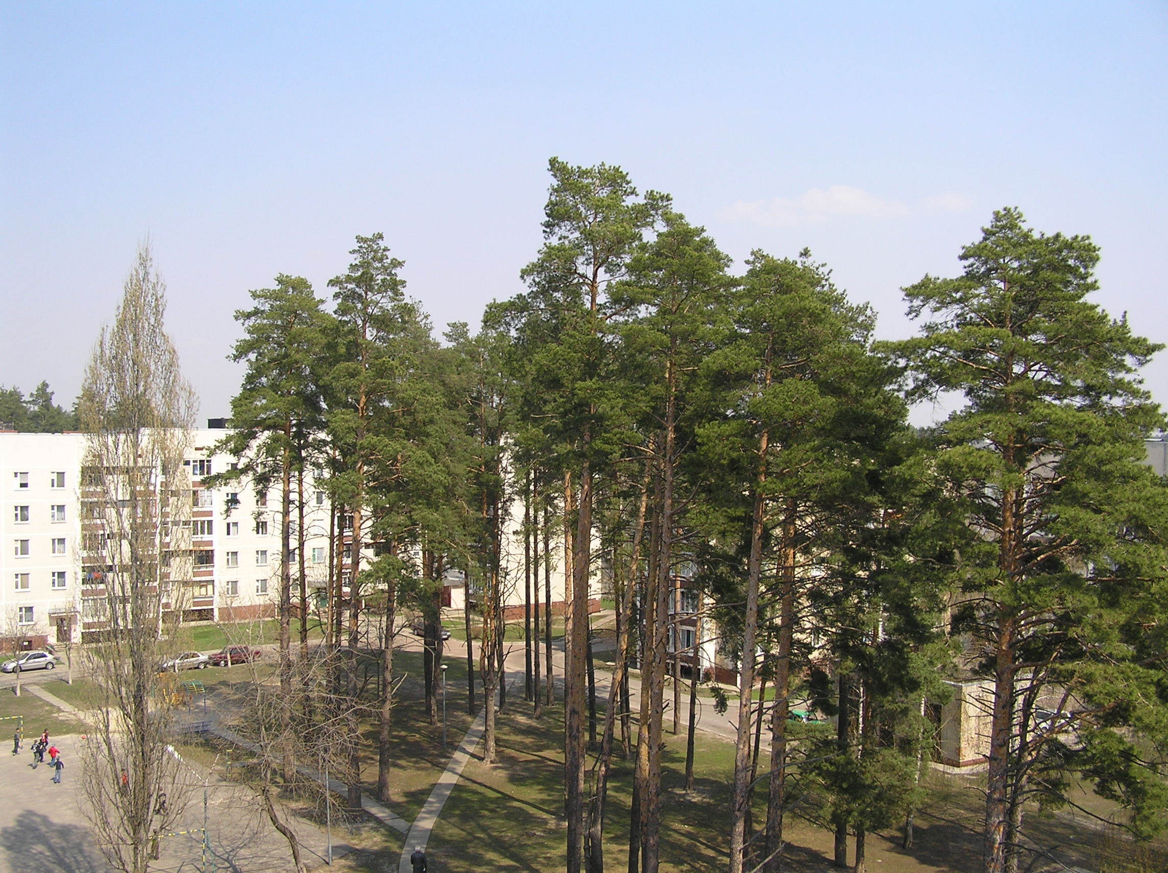 Вид внутреннего двора Московского квартала, Славутич